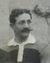 Marcel Laffitte en 1910 (SBUC).